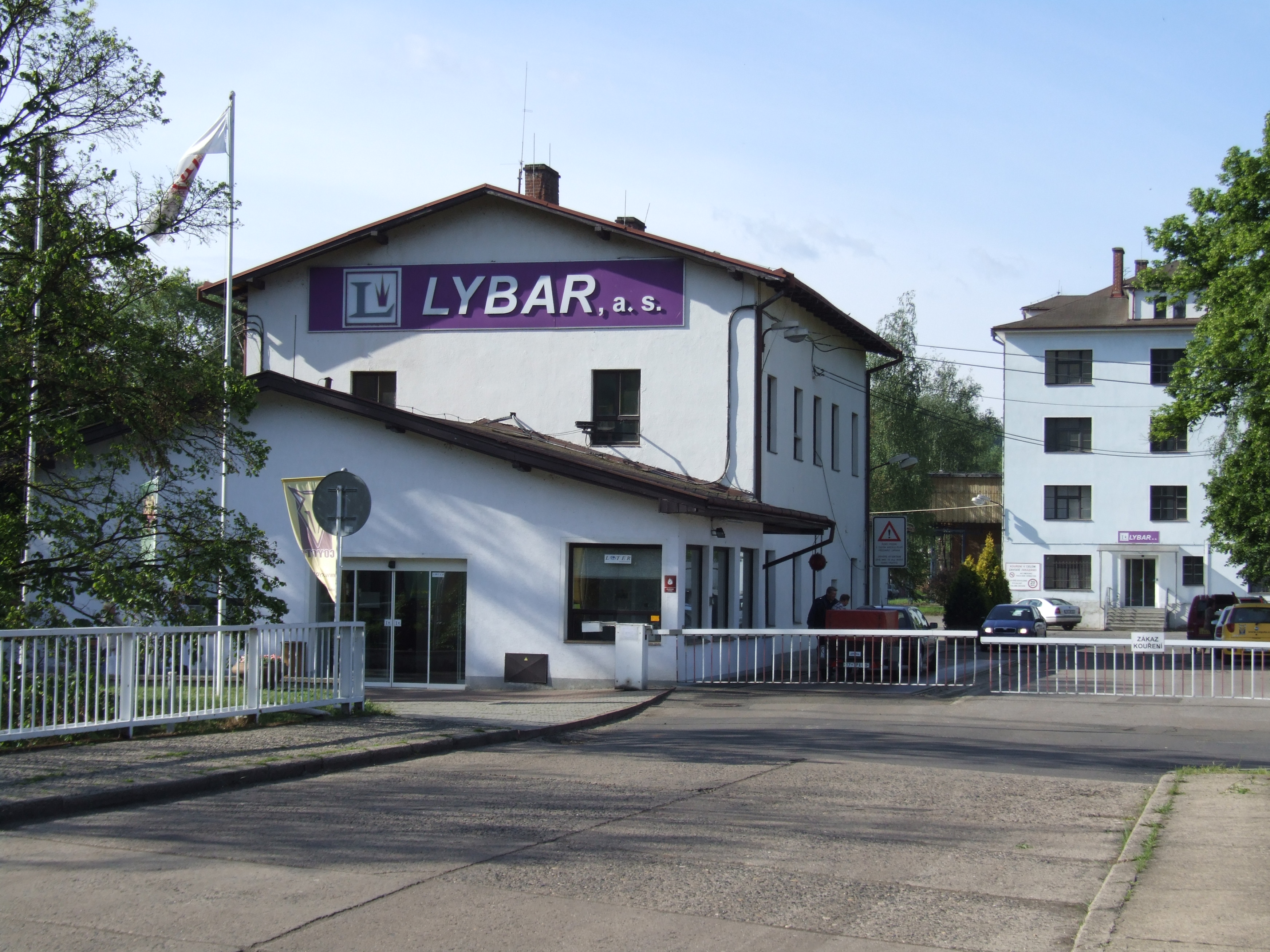 Vstup do firmy Lybar, květen 2006